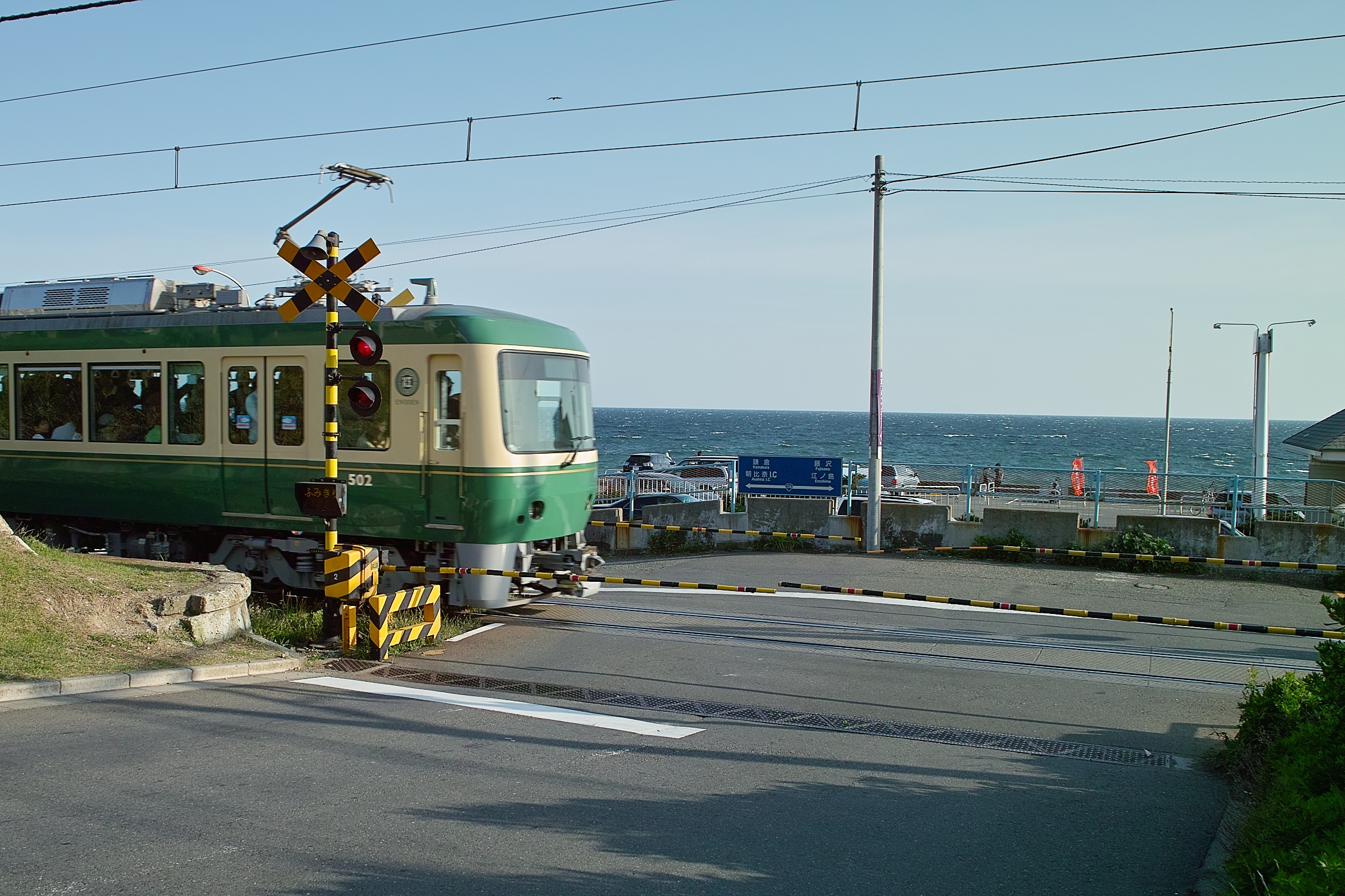 七里ガ浜高校脇の踏切から七里ガ浜を望む。 Sigma DP1